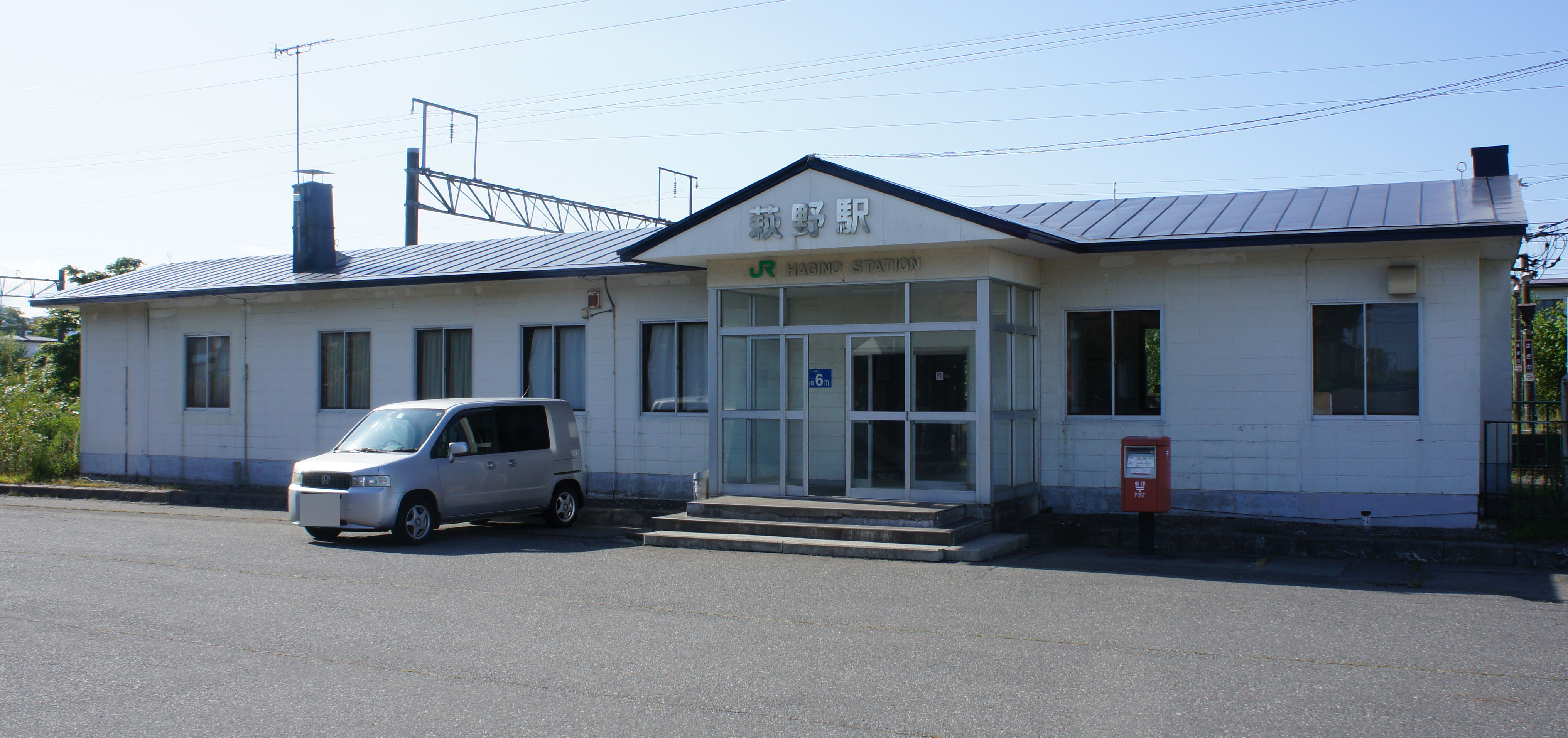 JR室蘭本線・萩野駅の駅舎